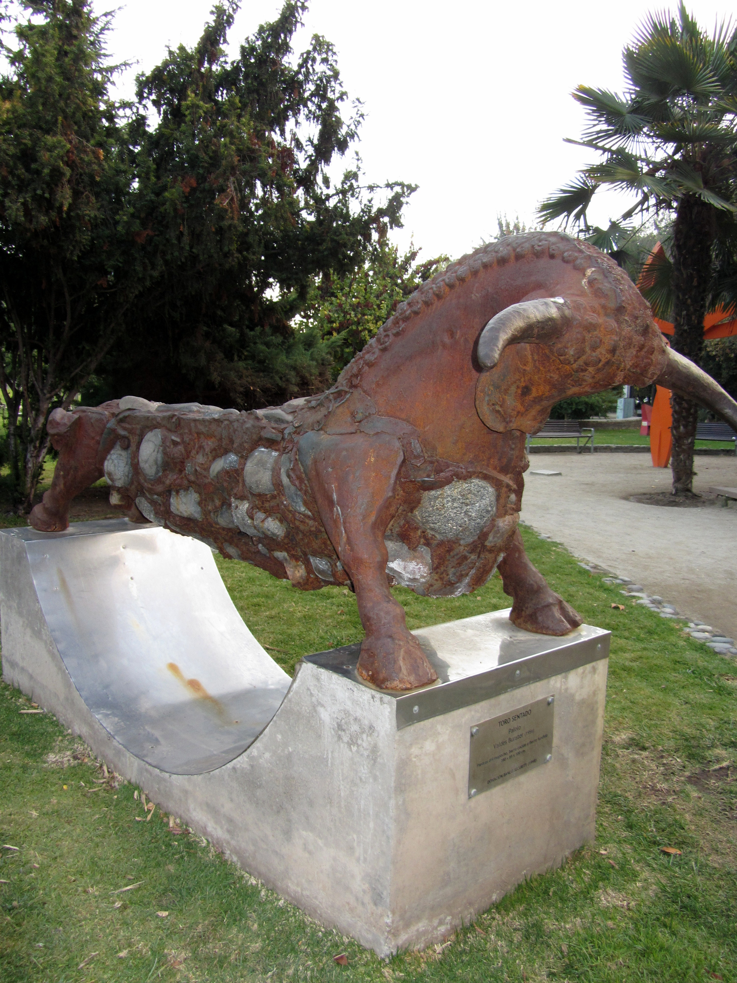 Toro sentado de Palolo Valdés; Parque de las Esculturas de Providencia